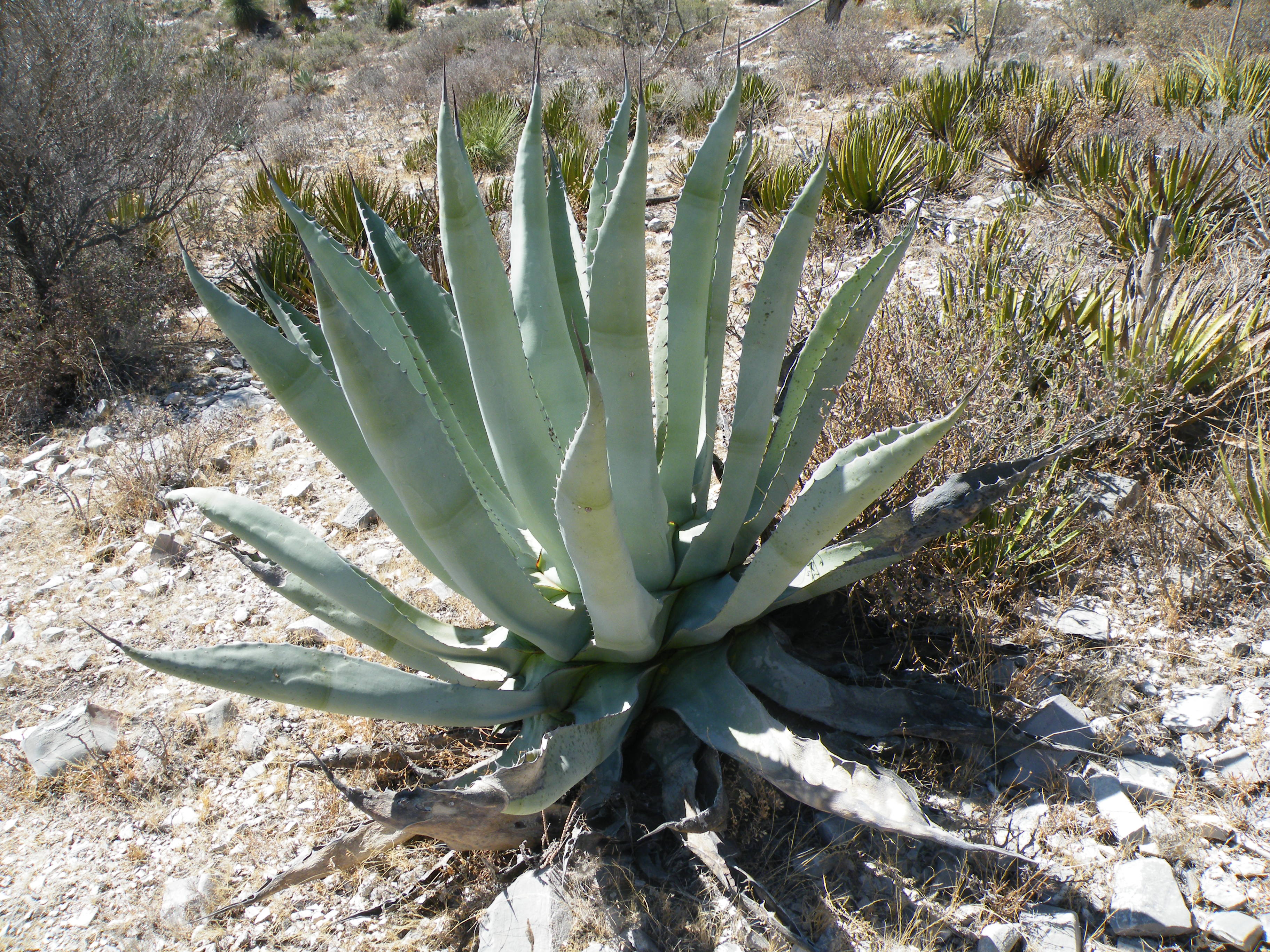 Doctor Arroyo, Nuevo Leon